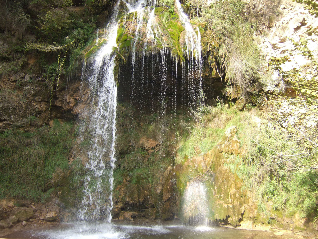 Водопад Велики бук (Лисине), на Бељаници